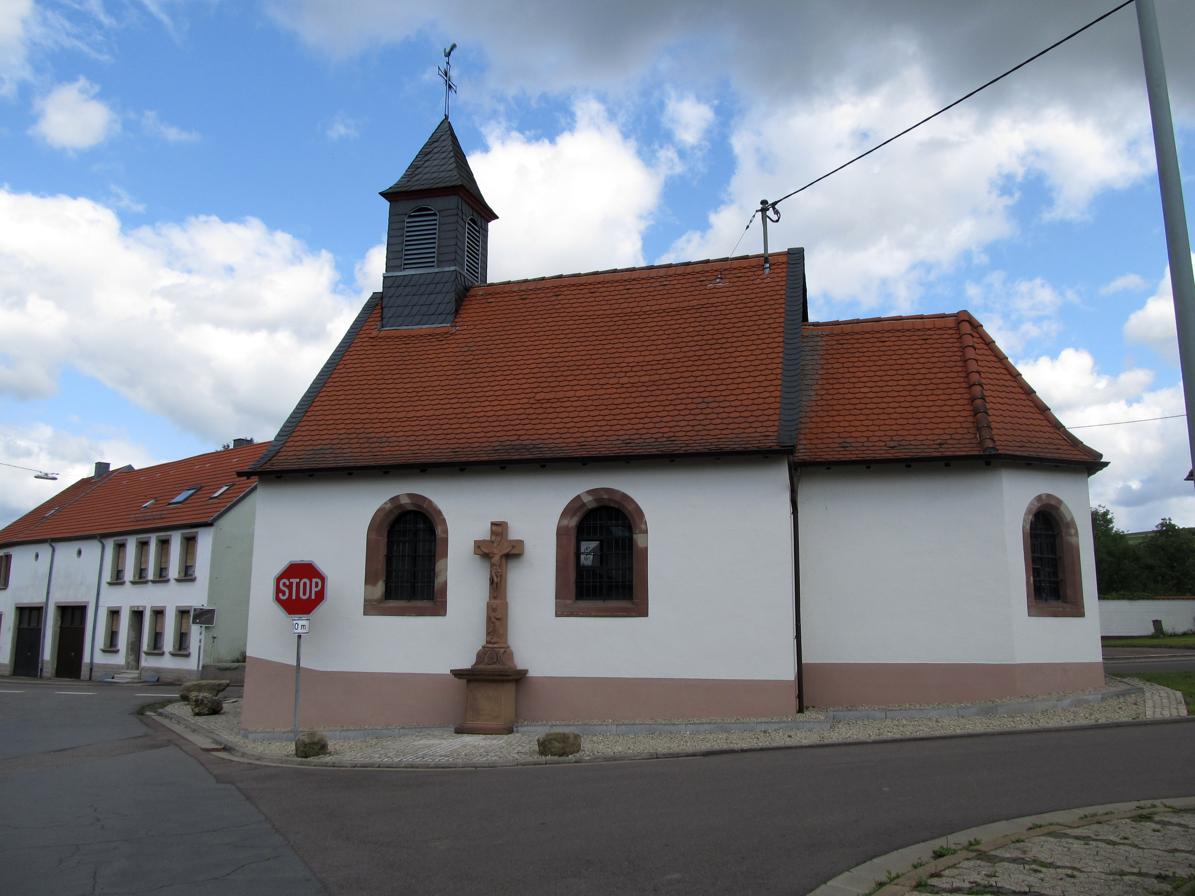 Die St. Annakapelle in Habkirchen, Gemeinde Mandelbachtal, Saarland